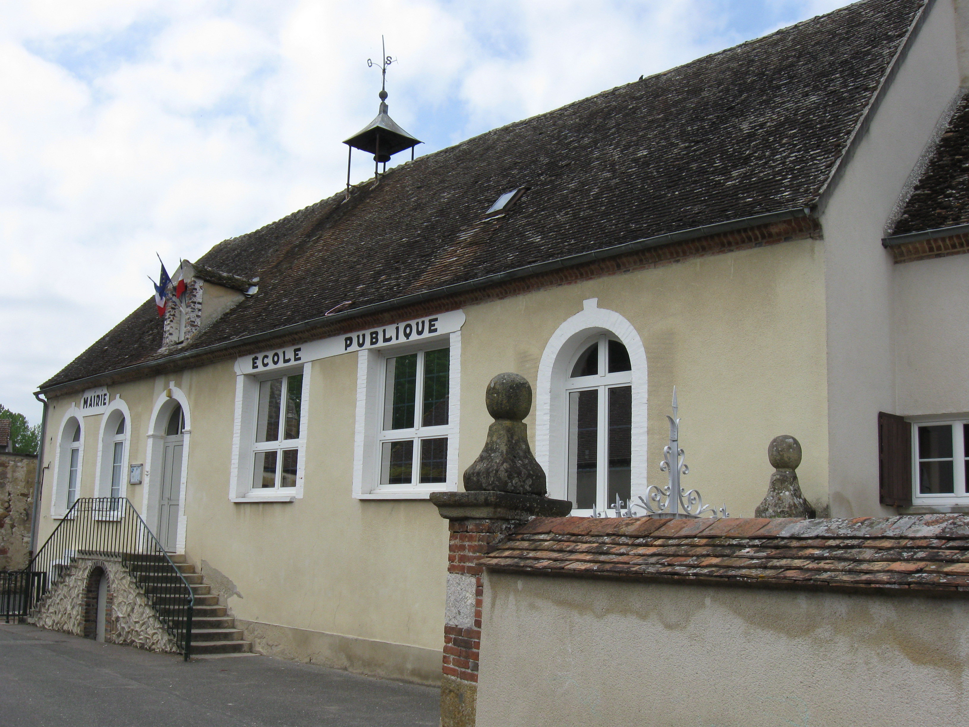 Mairie de Vimpelles. (Seine-et-Marne, région Île-de-France).